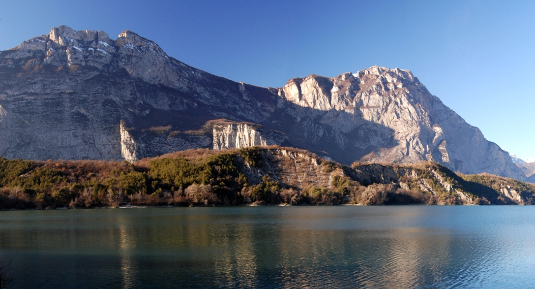 I monti Brento e Casale visti dalla sponda Est del Lago di Cavedine, Valle dei Laghi (Italy)